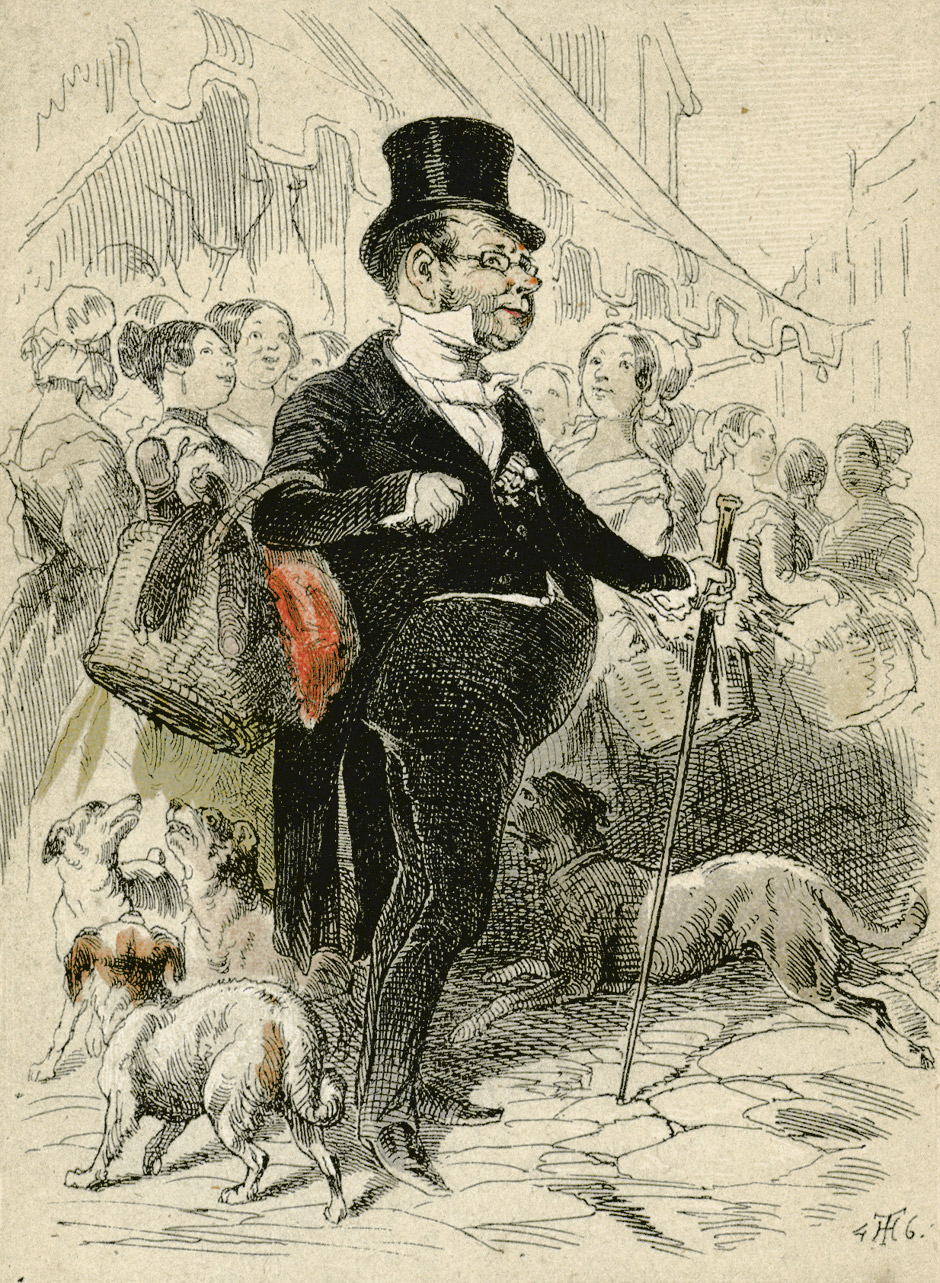 Illustration aus A. J. Groß-Hoffinger: Wien wie es ist, Lithographie von Theodor Hosemann (datiert 1846), Leipzig, Jackowitz, 1847.